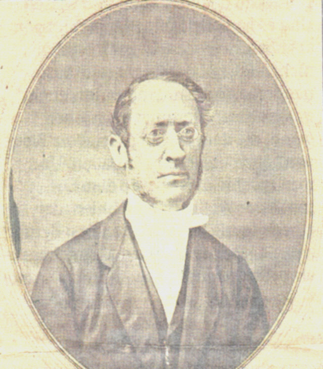 Reinhard Schellenberg - badischer Oberkirchenrat